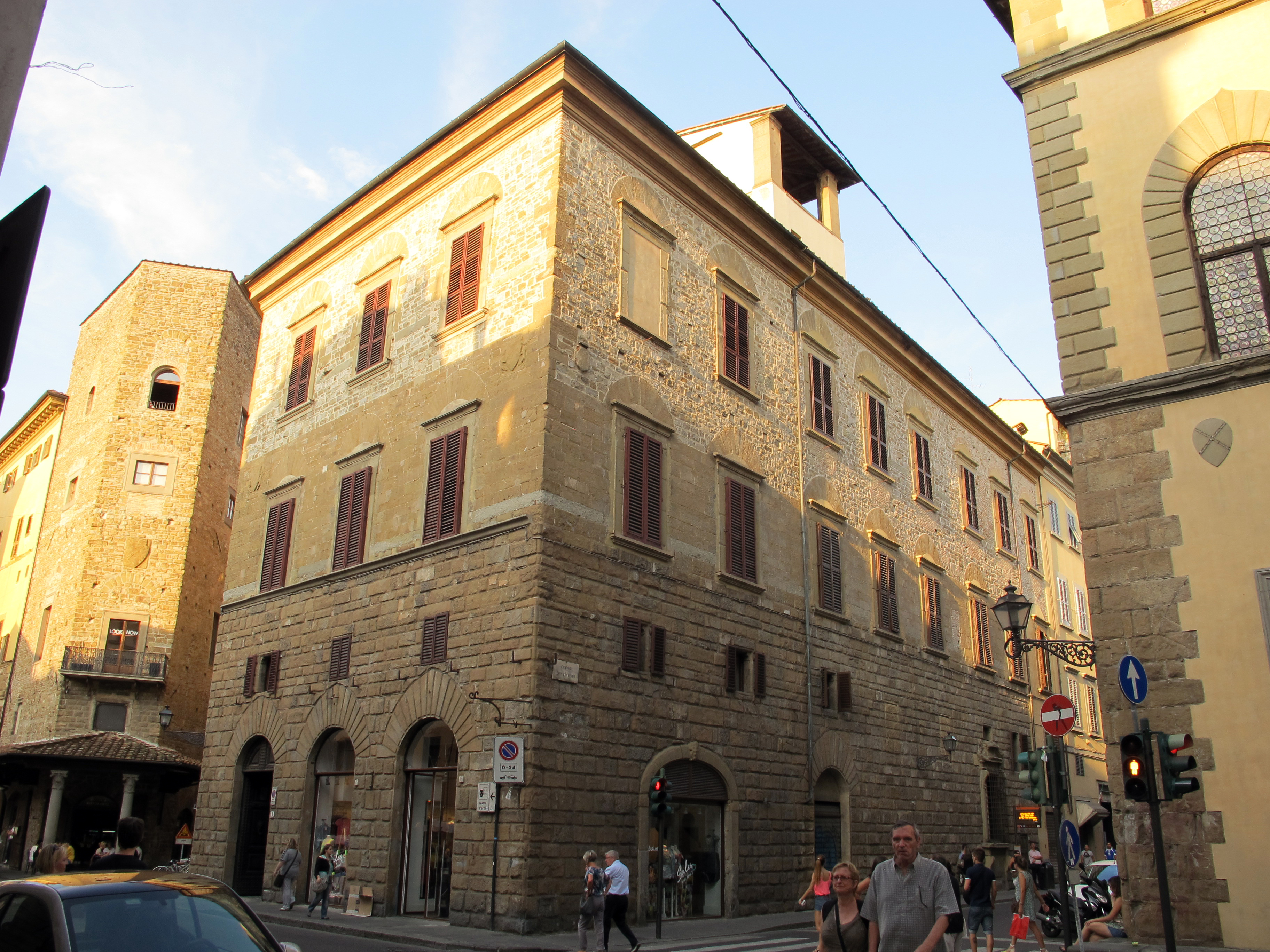 Palazzo Mancini, veduta ext